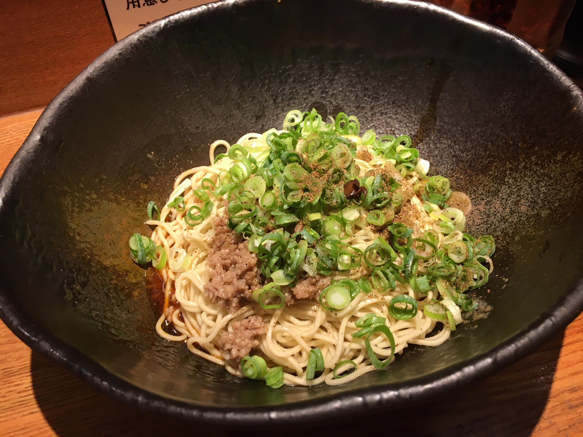 広島キング軒の汁なし担々麺